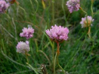 Armeria maritima